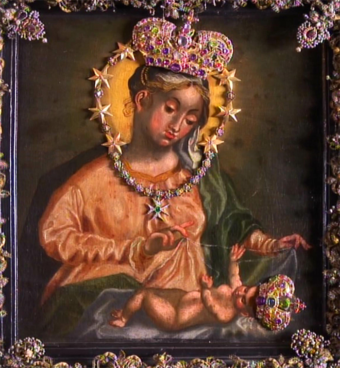 Gnadenbild von Maria Plain : Tableau de Maria Trost image miraculuse de la basilique de Maria Plain Autriche